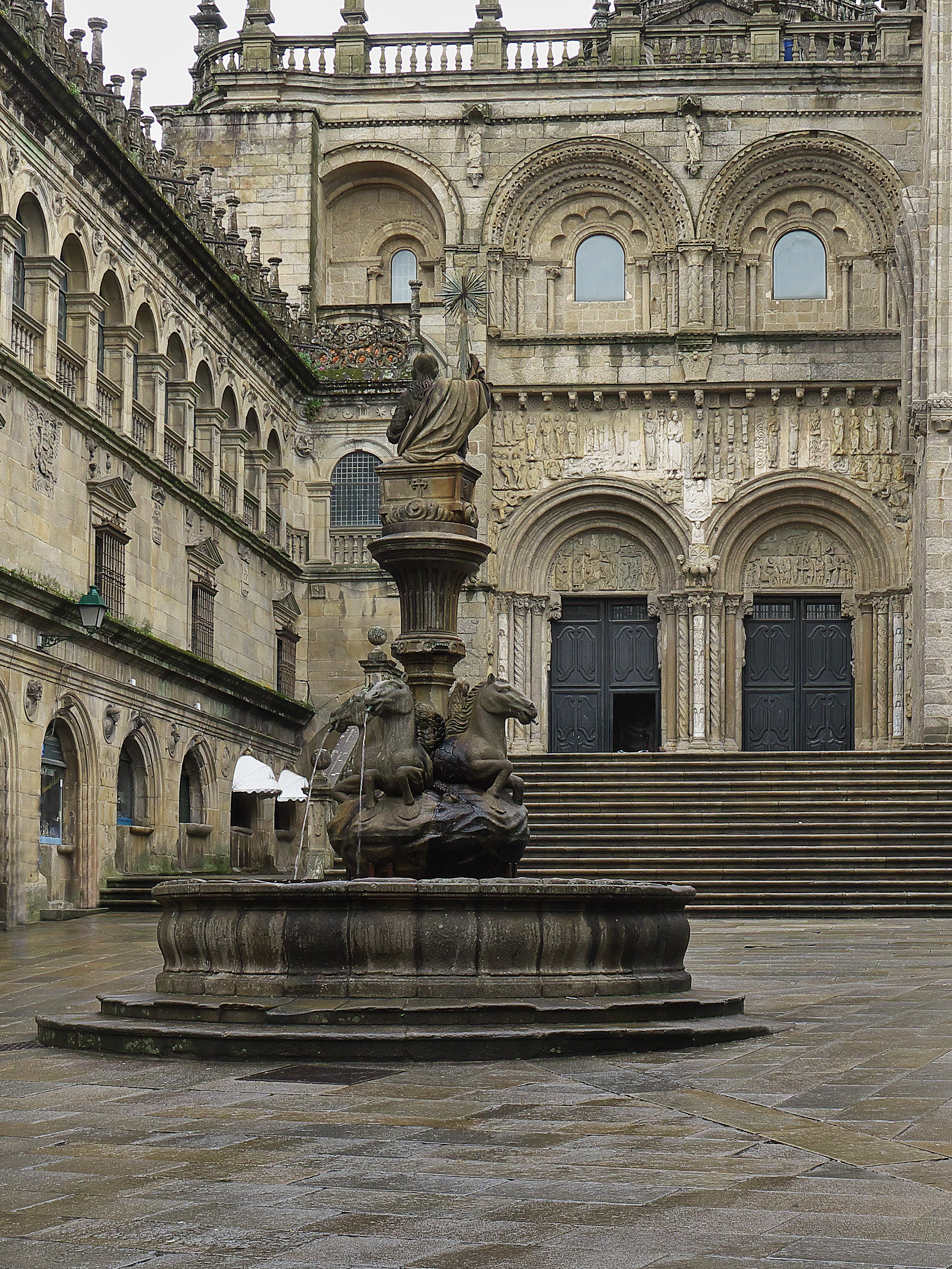 En el año 1825 se instala en la Plaza de Platerías, la neoclásica Fuente de los Caballos.